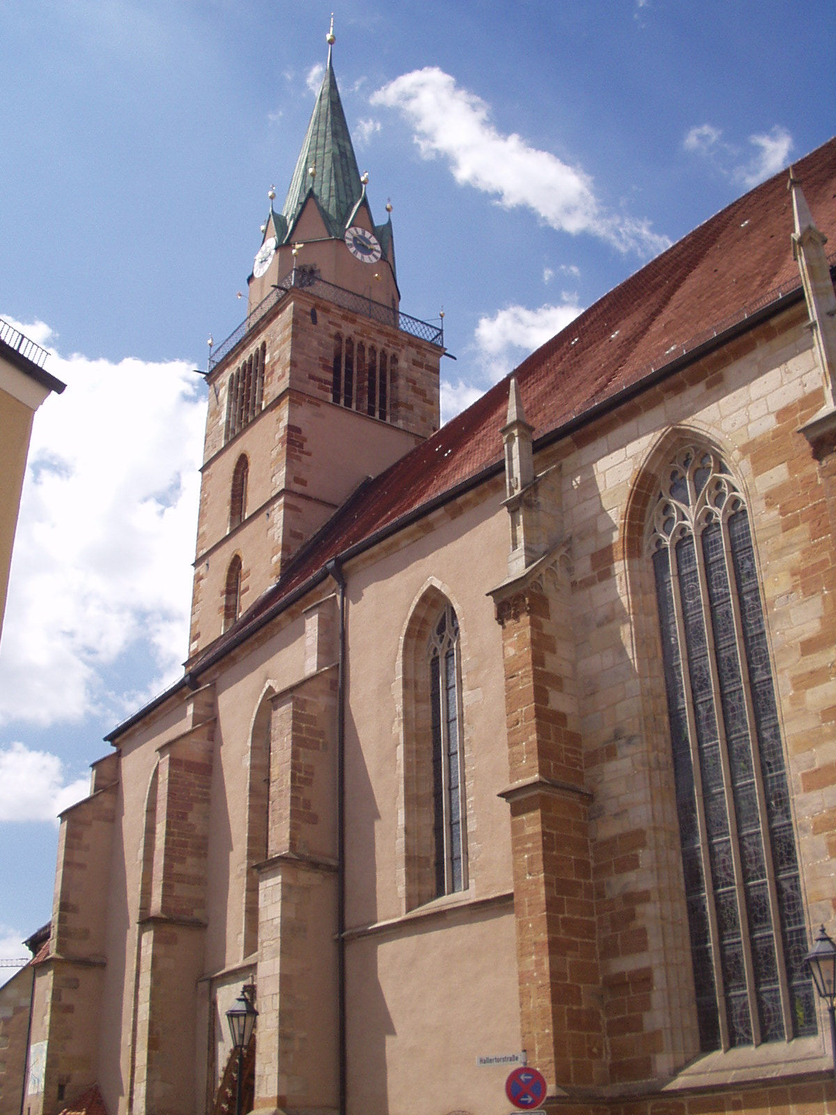 Außenansicht der Kirche St. Johannes in Neumarkt in der Oberpfalz